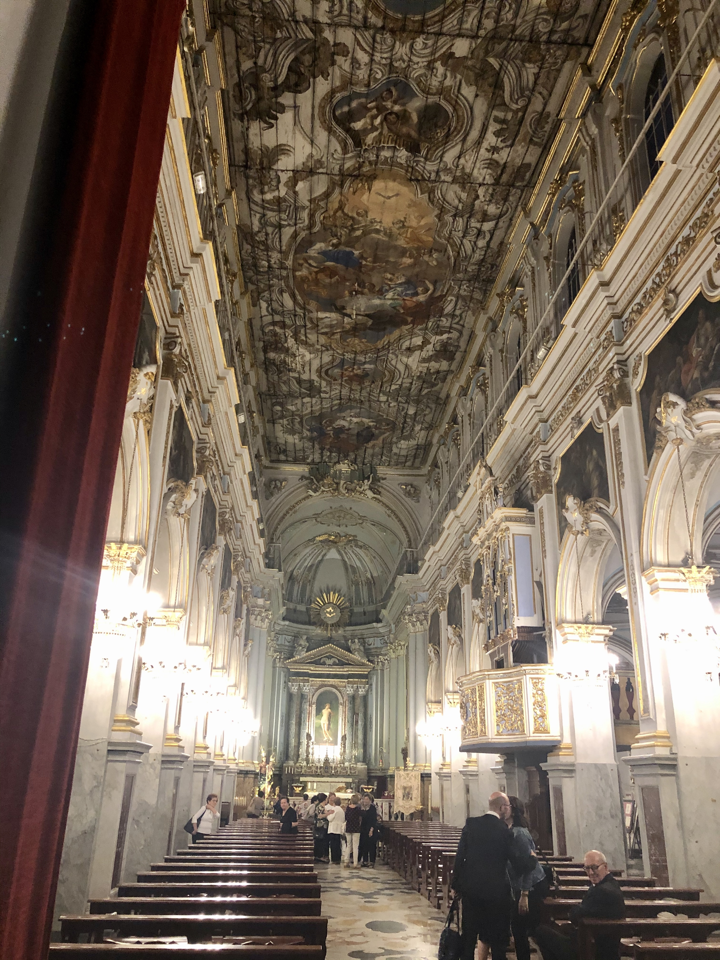 Interni basilica San Sebastiano, Melilli